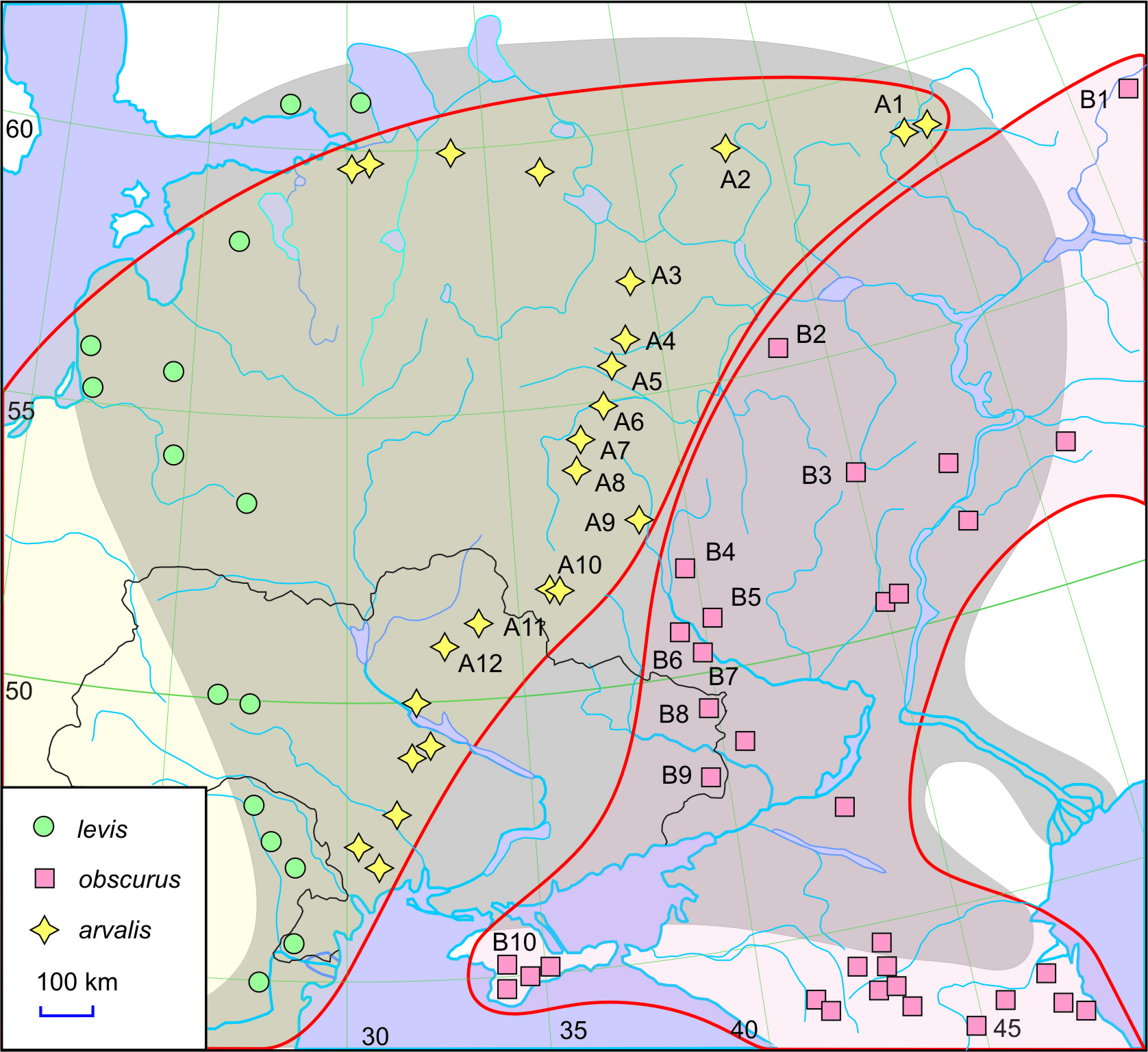 geographical ranges of 3 sibling-species of common voles (Microtus arvalis, Microtus оbscurus, Microtus levis) in eastern Europe: map of species distribution after Zagorodniuk 2007